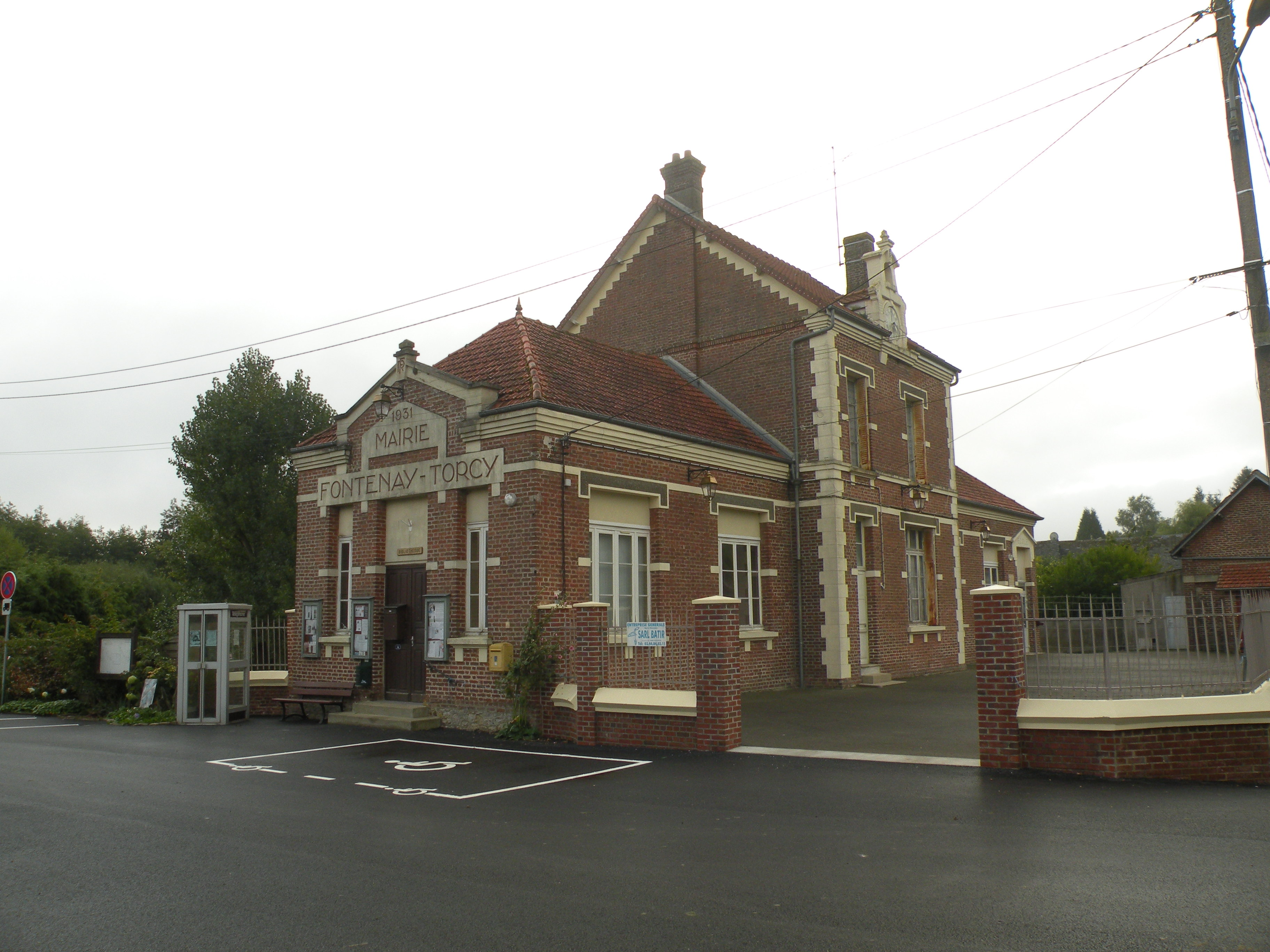 Fontenay-Torcy